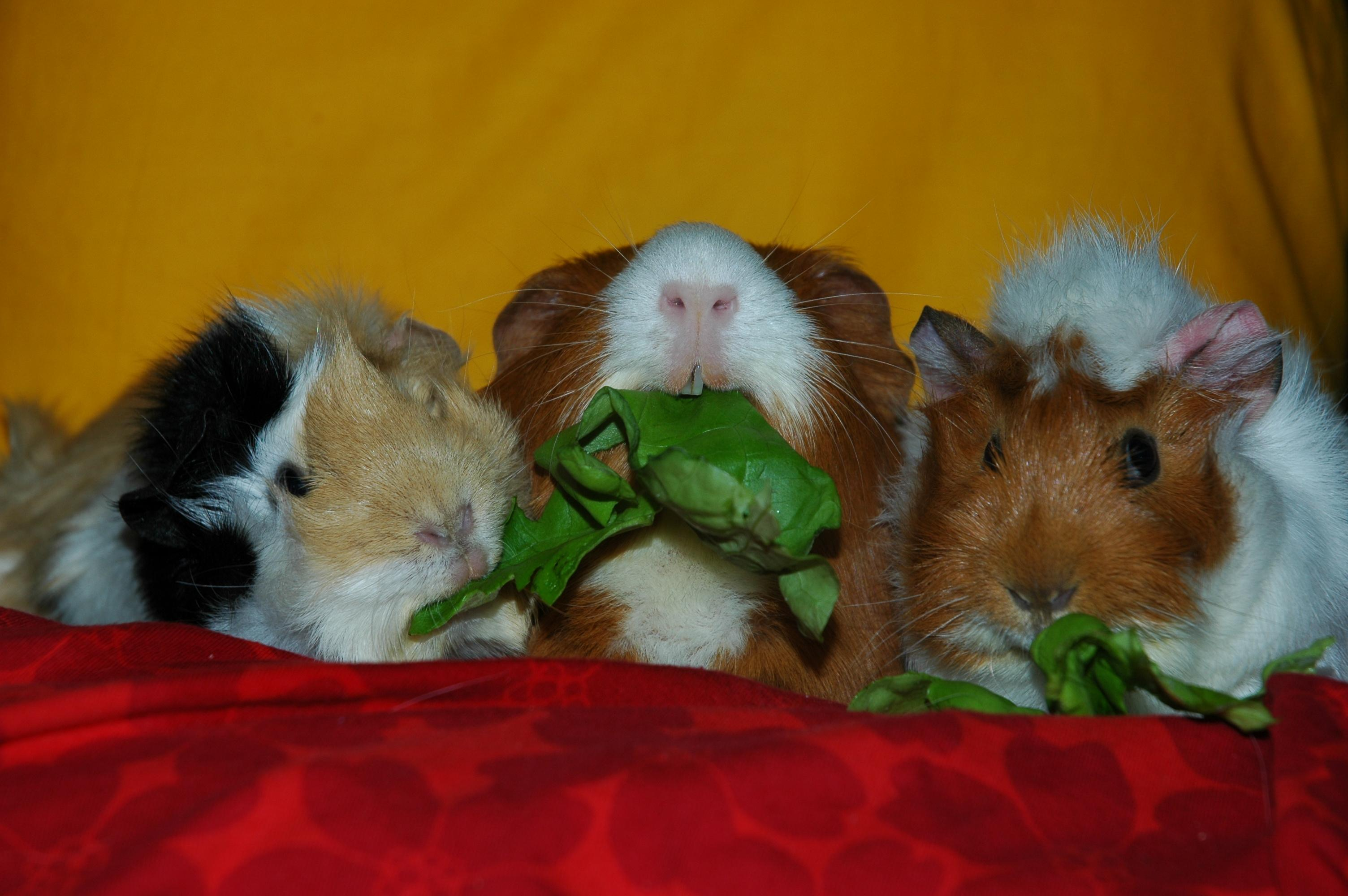 Drei Hausmeerschweinchen (Cavia porcellus) beim Essen von Löwenzahn. In der Mitte ein Bock, um ihn herum zwei Weibchen